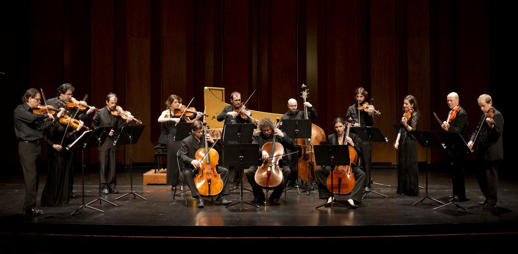 Ensemble Café Zimmermann en concert.